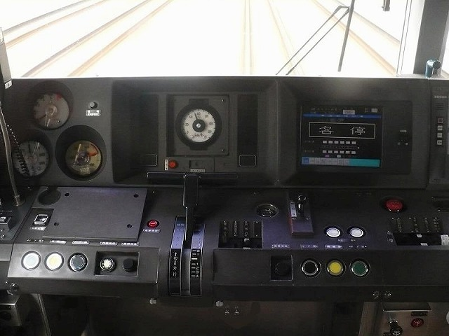 東急3000系の運転台